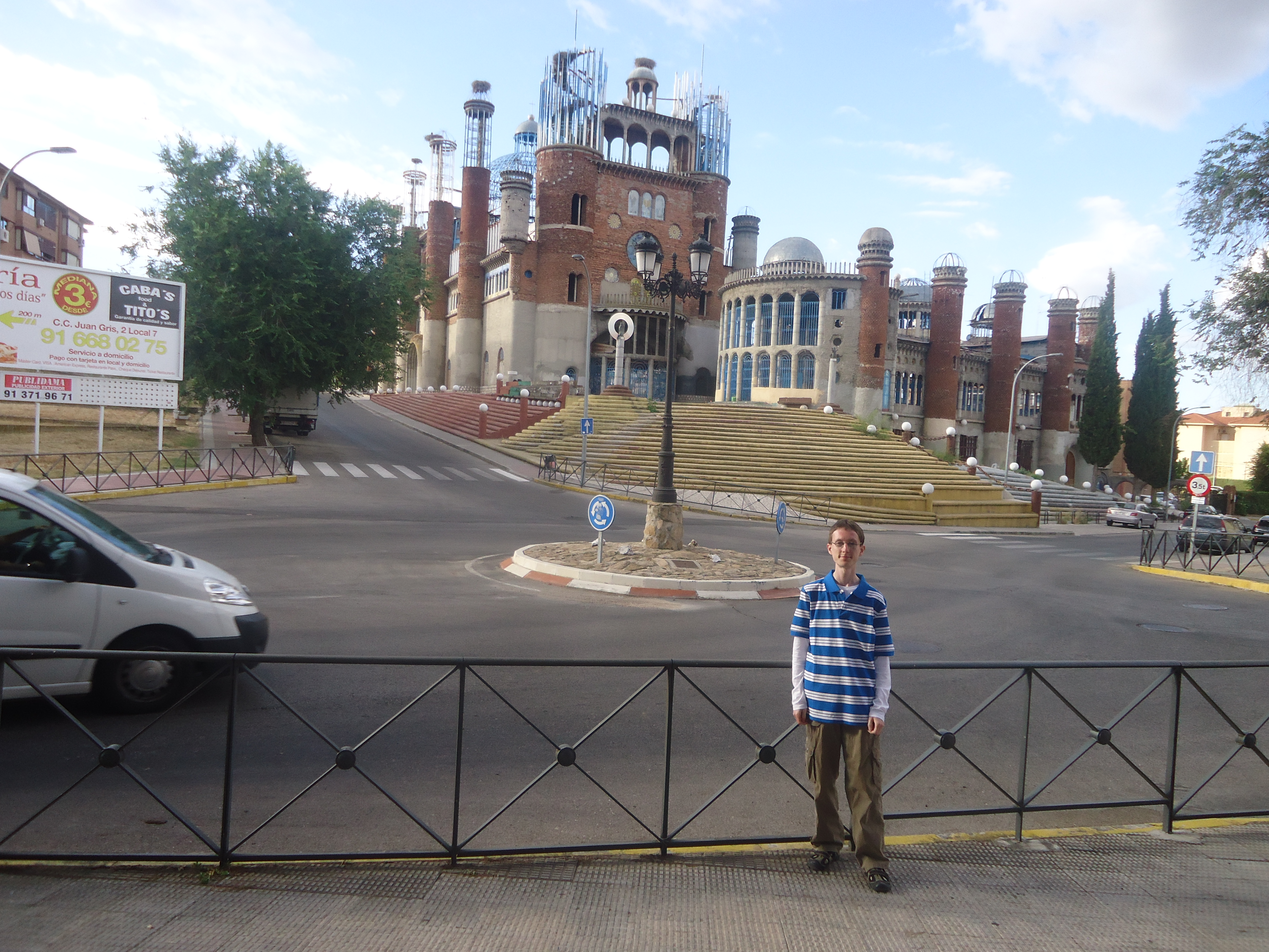 Cathedrale des Justo Gallego im Juli 2015